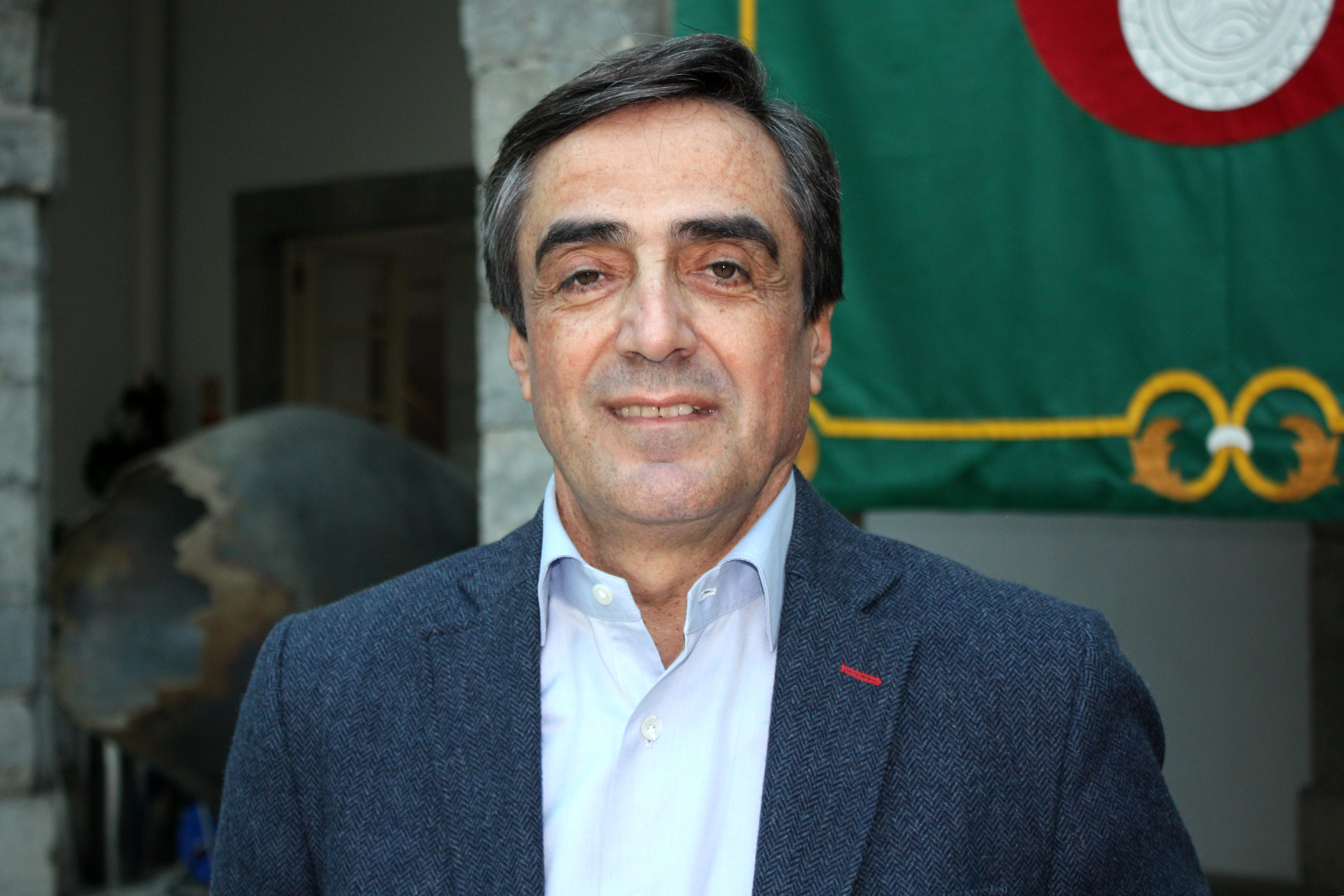 Ildefonso Calderón, diputado regional en la IX Legislatura y portavoz del PP en el Ayuntamiento de Torrelavega.